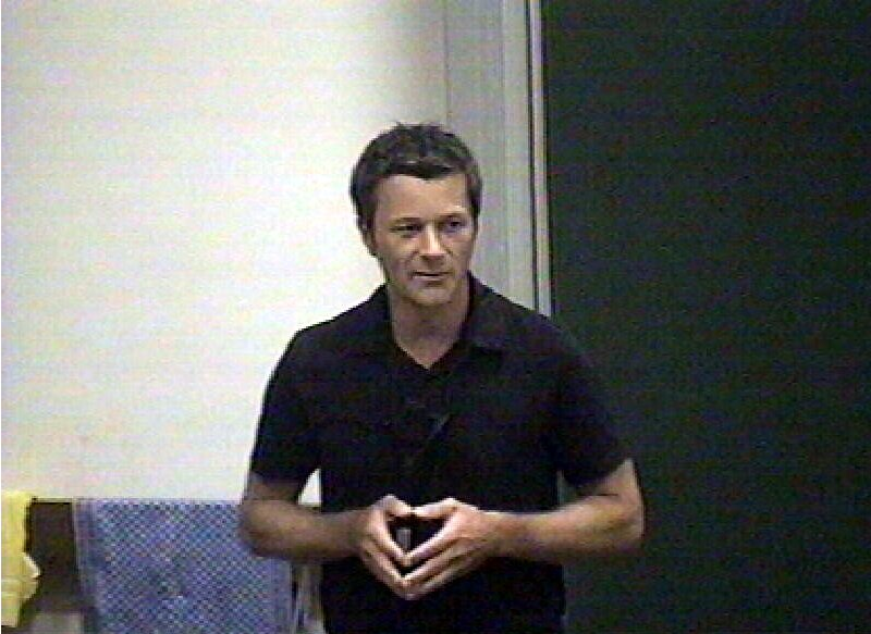 Prof. Dr. Hanno Würbel